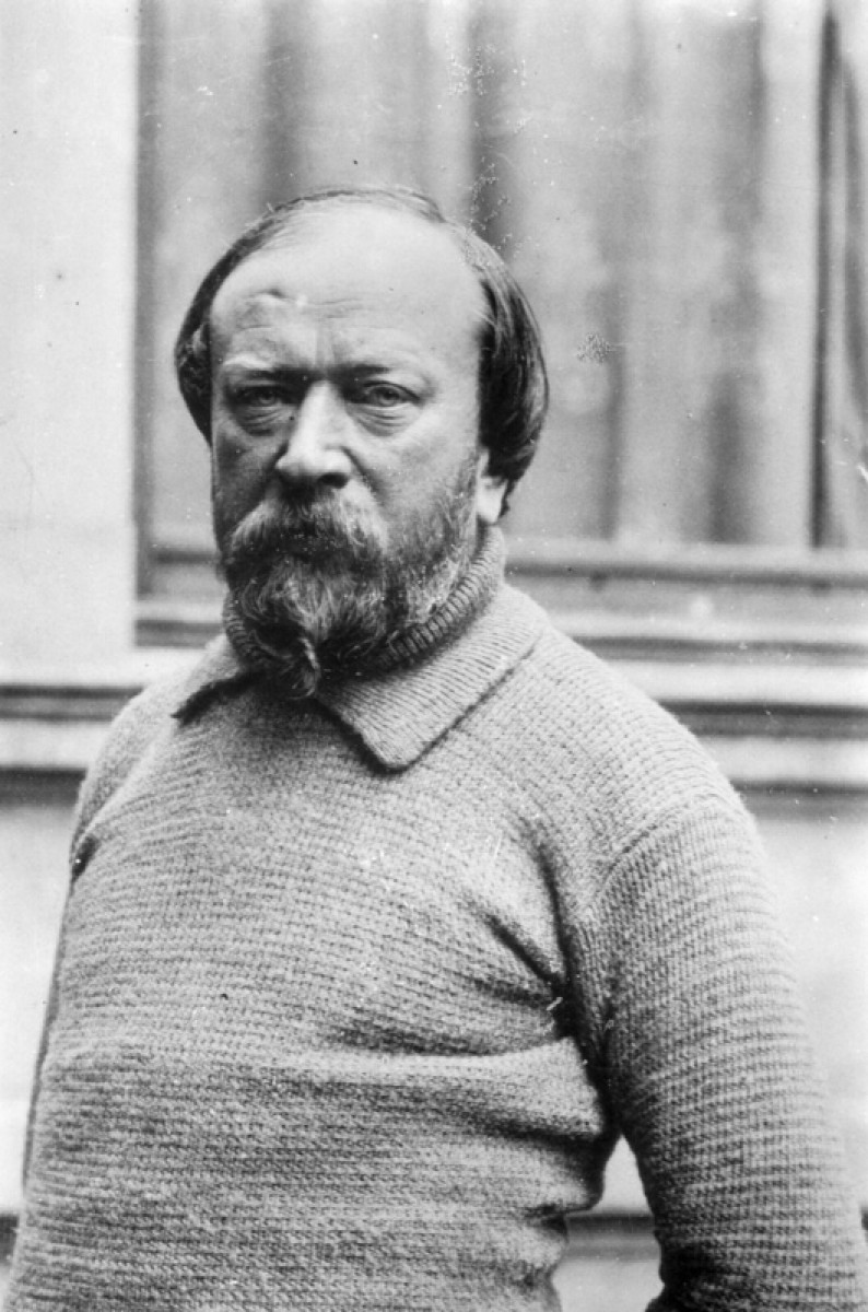 Foto di Carlo Bugatti scattata nel 1920